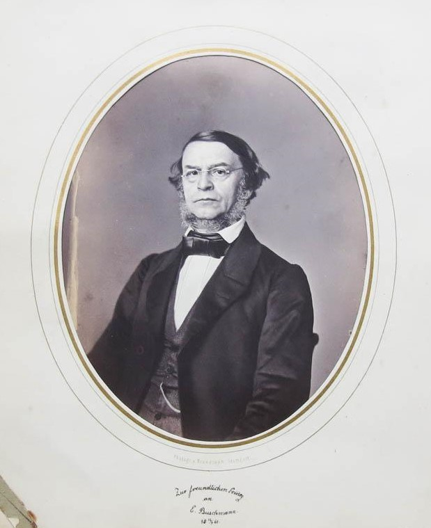 Prof. Maximilian Albert Landerer, Fotografie selbst ca. 16,3 x 12,5 cm